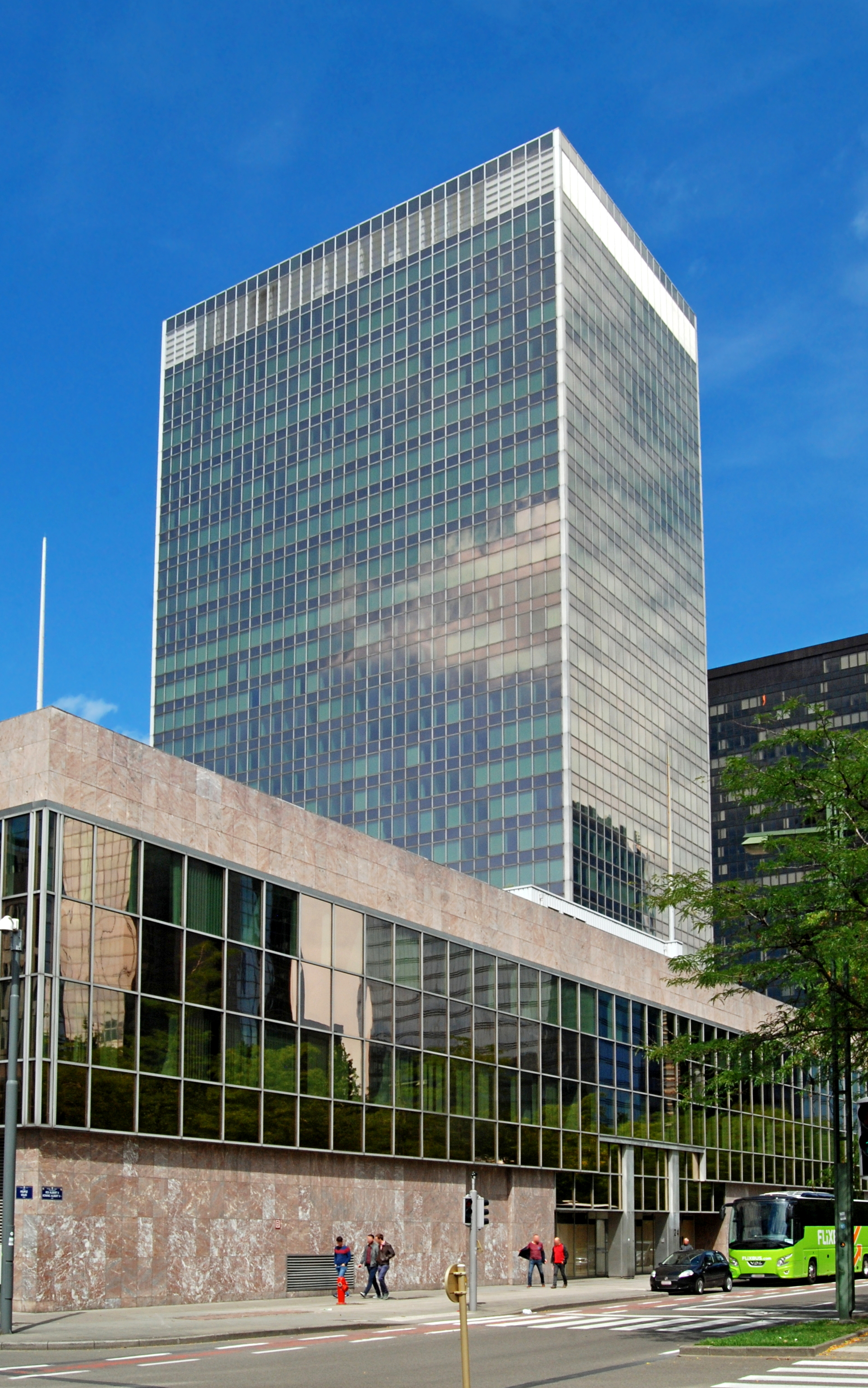 Belgique - Bruxelles - World Trade Center III (architecture fonctionnaliste - 1974 - René Stapels, Groupe Structures, André et Jean Polak)